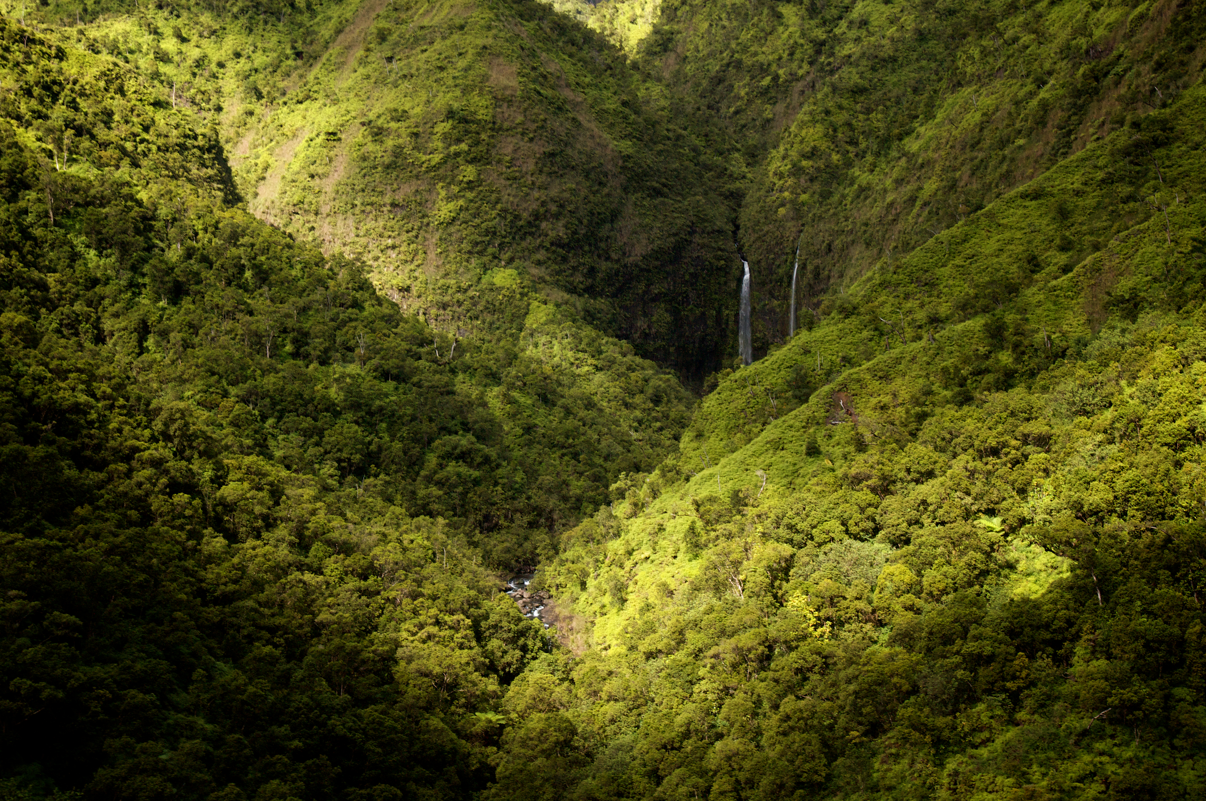 Forest near Hanalei Bay, Kauai, Hawaii